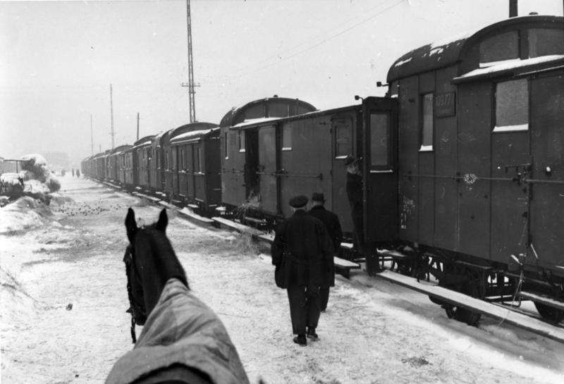 Kartoffelzug In diesem strengen Winter kommen täglich Kartoffelzüge in Berlin an. Hier ein Kartoffelzug der aus heizbaren Gepäckwagen besteht. Januar 1940